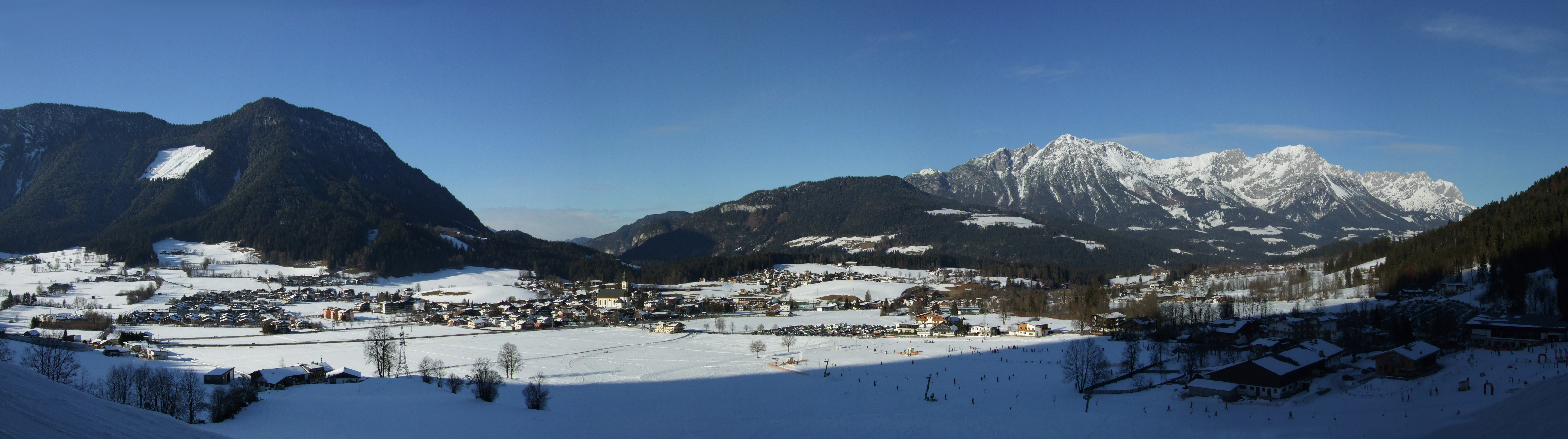 Blick von der Talabfahrt Skigebiet Söll; rechts Wilder Kaiser; Söll mit Dorfkirche